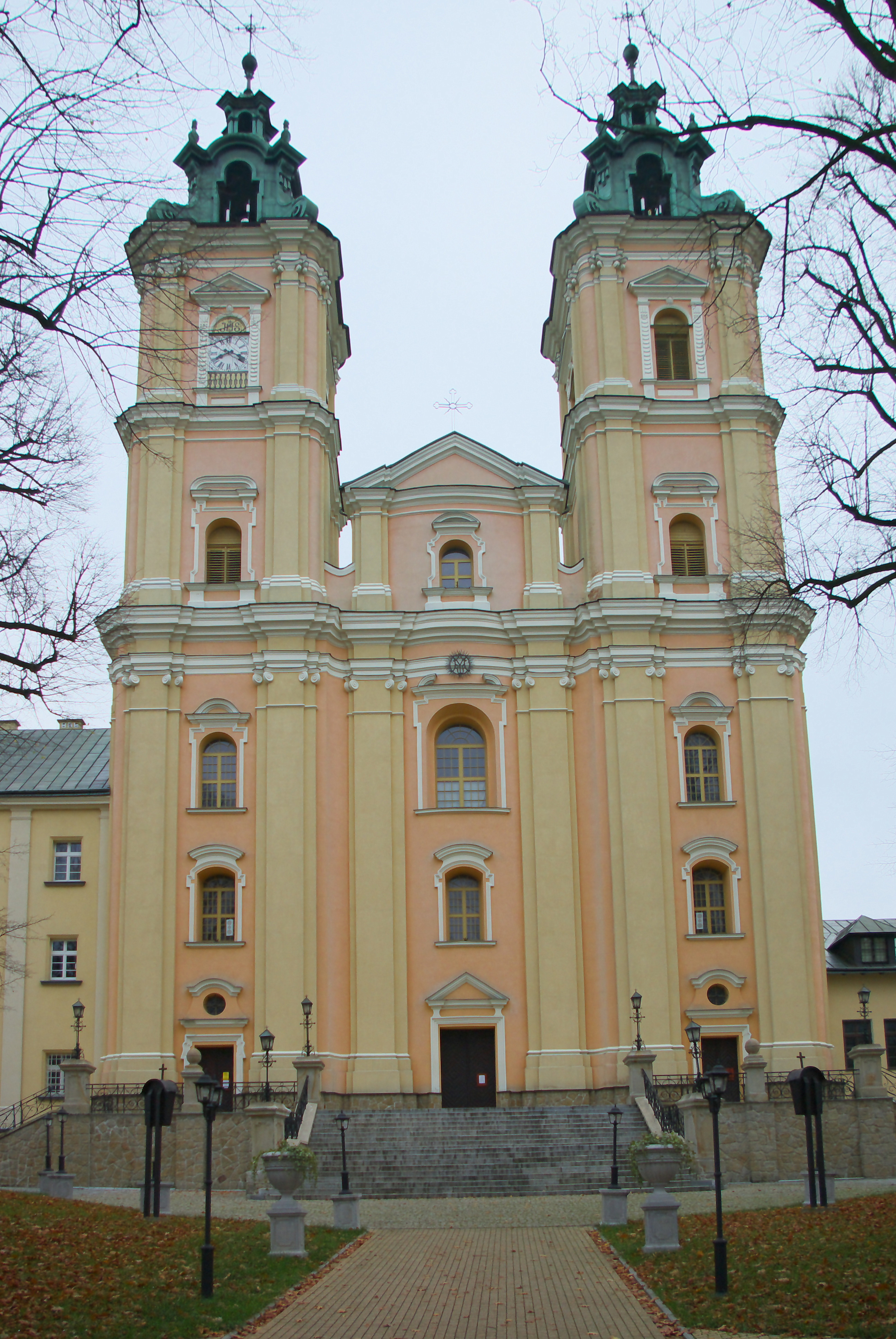 Bazylika Wniebowzięcia Najświętszej Maryi Panny w Starej Wsi (2017).